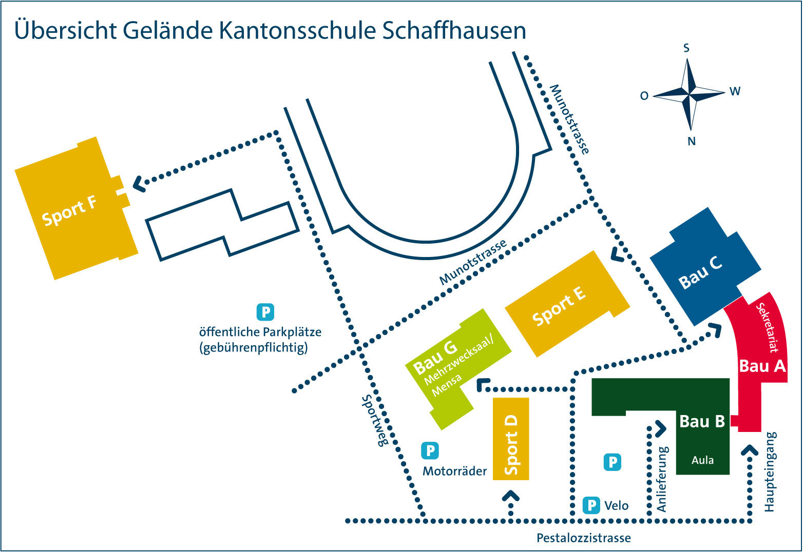 Kantonsschule Schaffhausen Lageplan